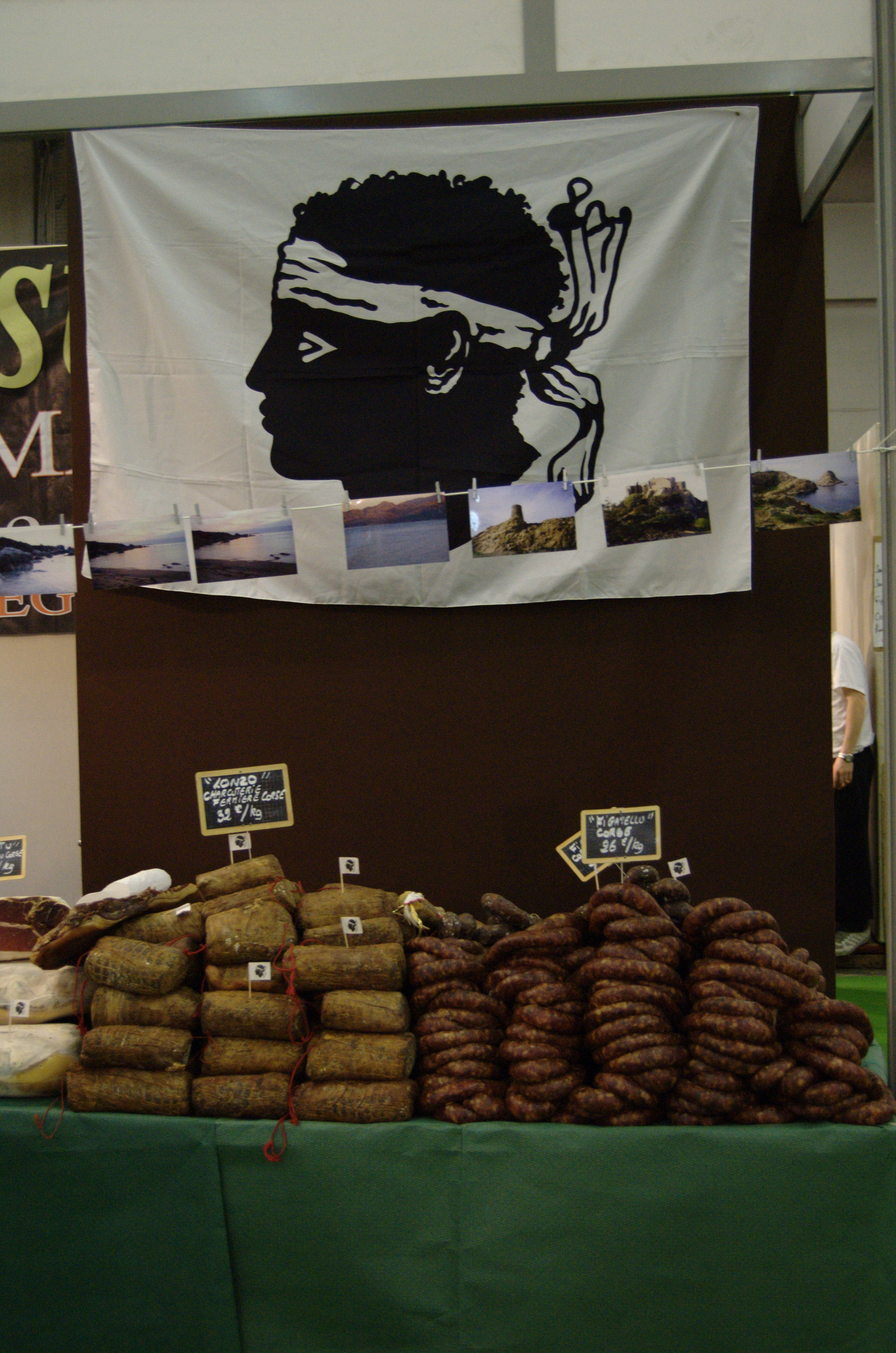 Charcuteries Corses - Salon international de l'agriculture 2009 - Paris - France - 22 février 2009.